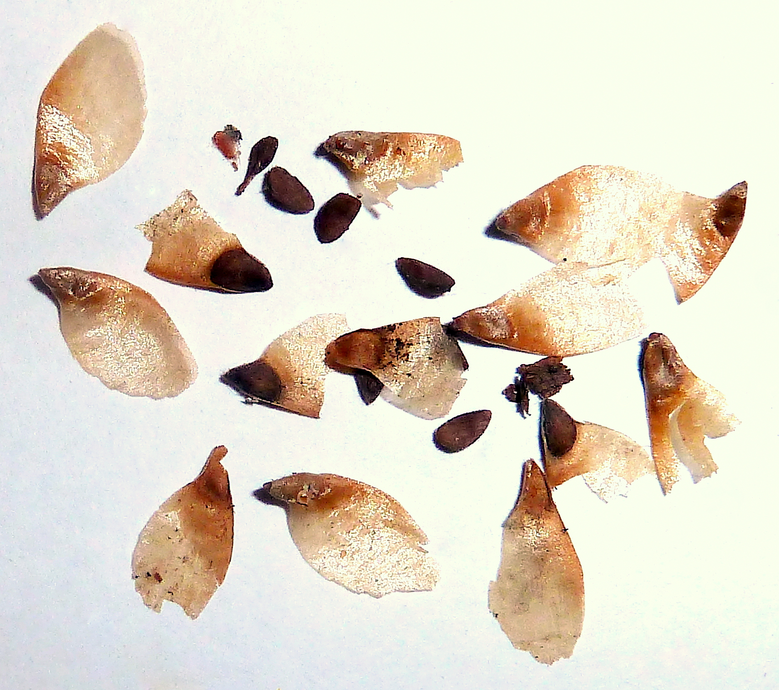 Picea abies (pícea común, pícea de Noruega, pícea europea) - Semillas aladas sueltas. - Parque del Retiro, Madrid, España